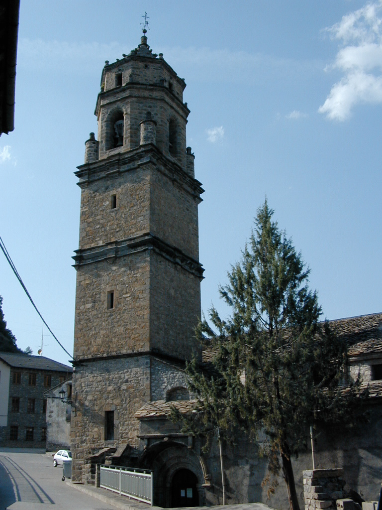 Torre de la Iglesia de Labuerda